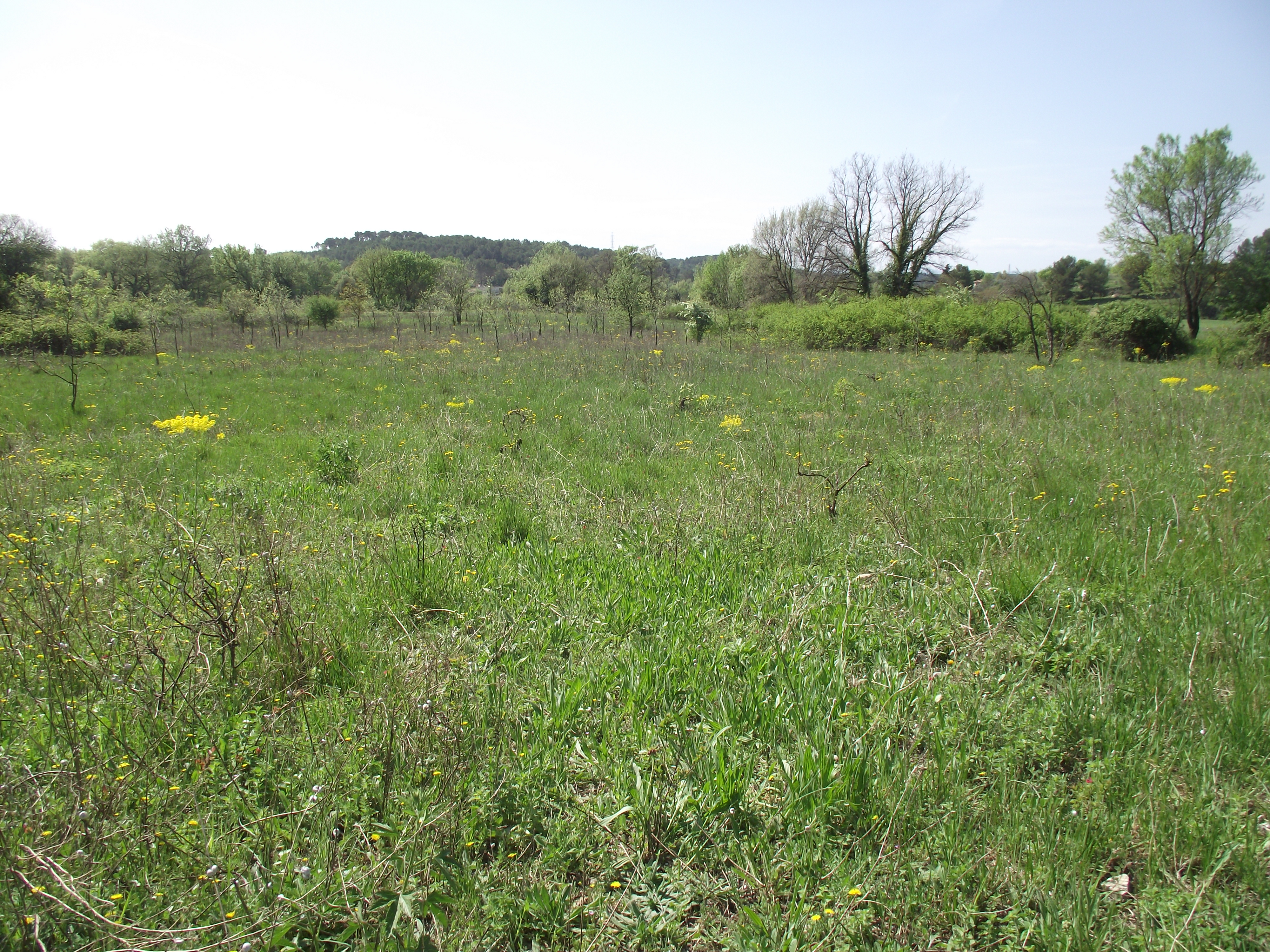 Dépression dont la formation à commencée avant la période vindobodienne. Elle s'est particulièrement creusée au quaternaire. Le processus de formation et toujours actif. Elle est située sur la commune de Draguignan-Var-France dans le secteur : Les Négadis et Sainte Barbe.